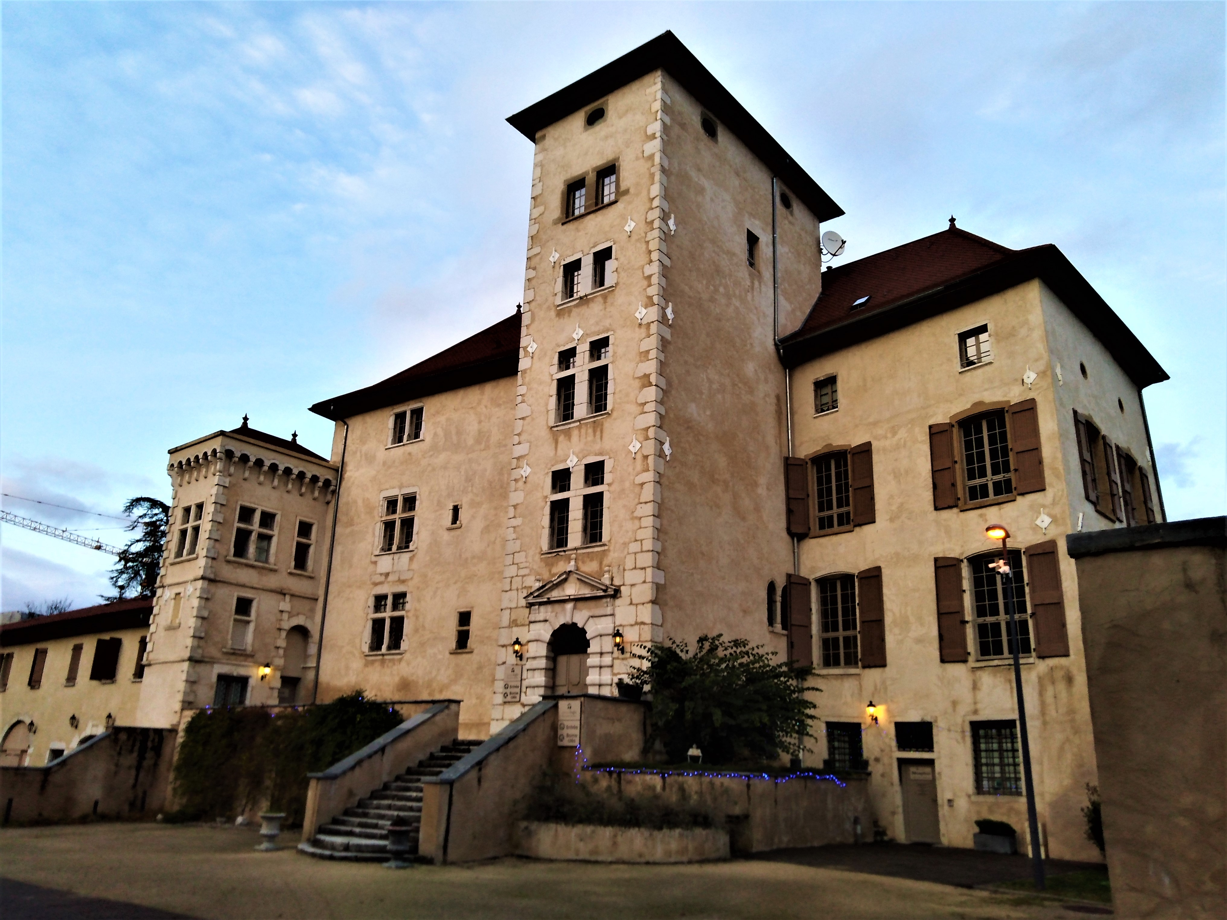 Fontaine (Chateau de la Rochette)